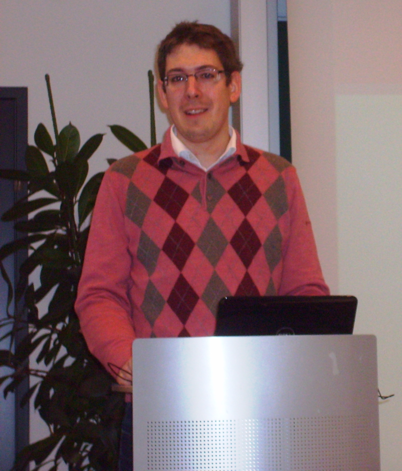 Kovács Gusztáv teológus